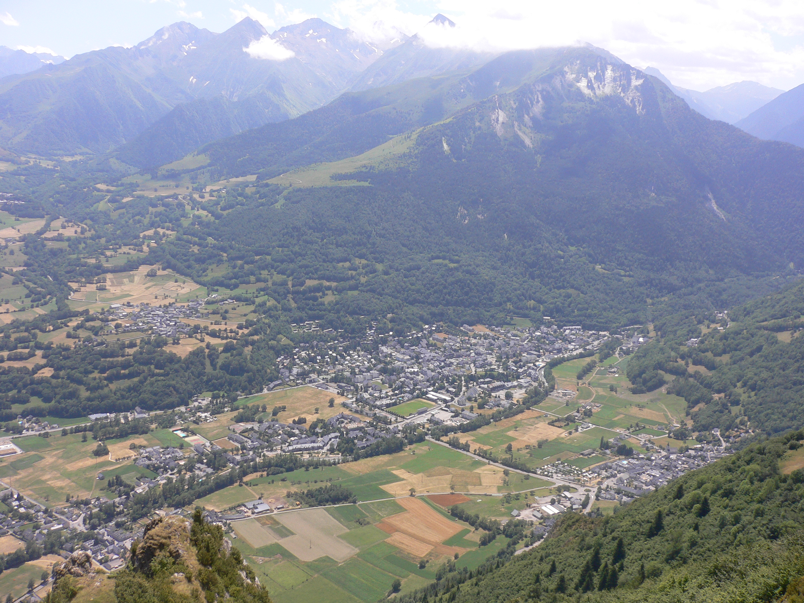 village de Saint-Lary-Soulan